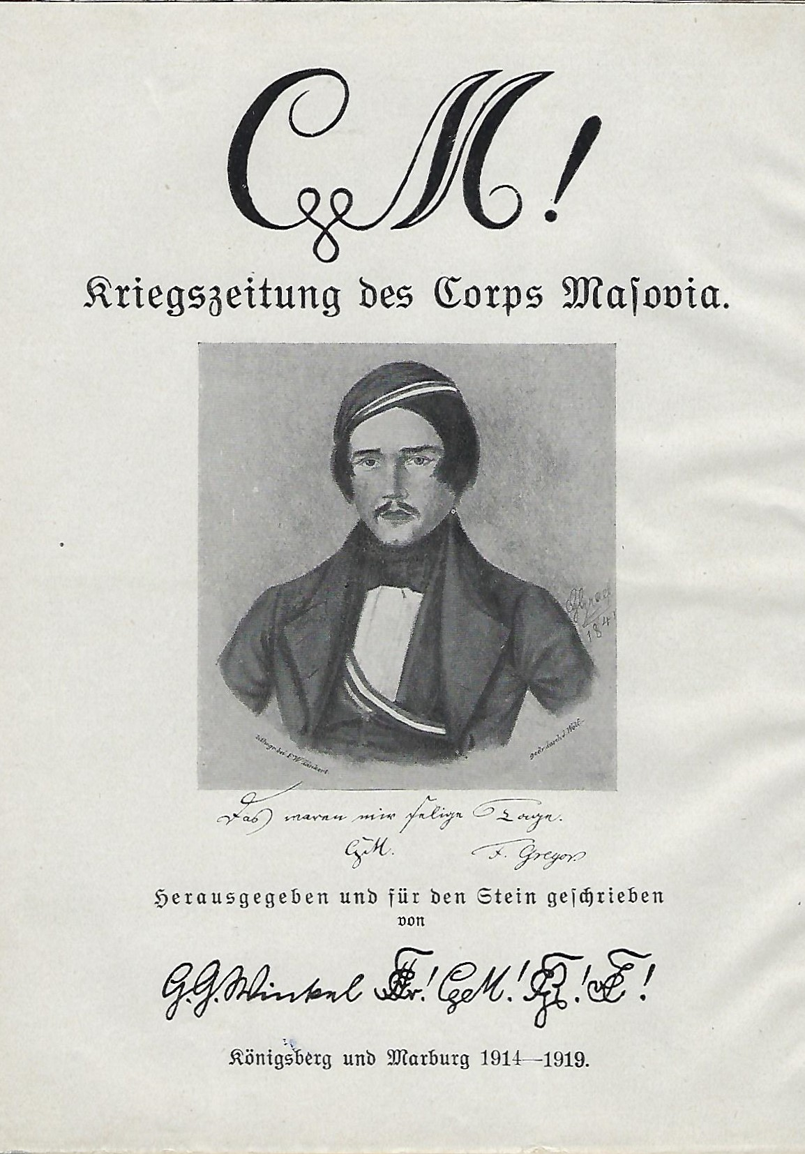 Schmutztitel vom 2. Band der Kriegszeitung des Corps Masovia, 1914–1919